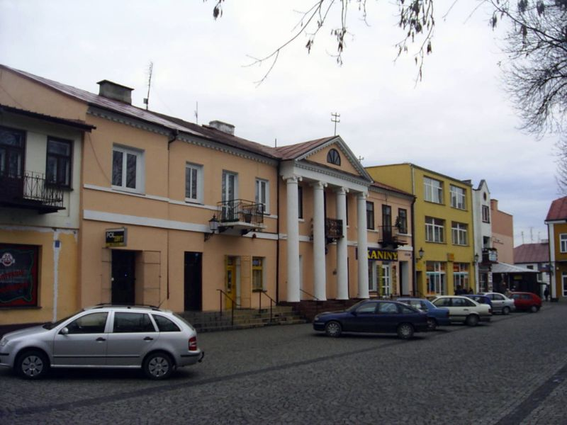 Kamieniczki przy rynku w Międzyrzecu Podlaskim.